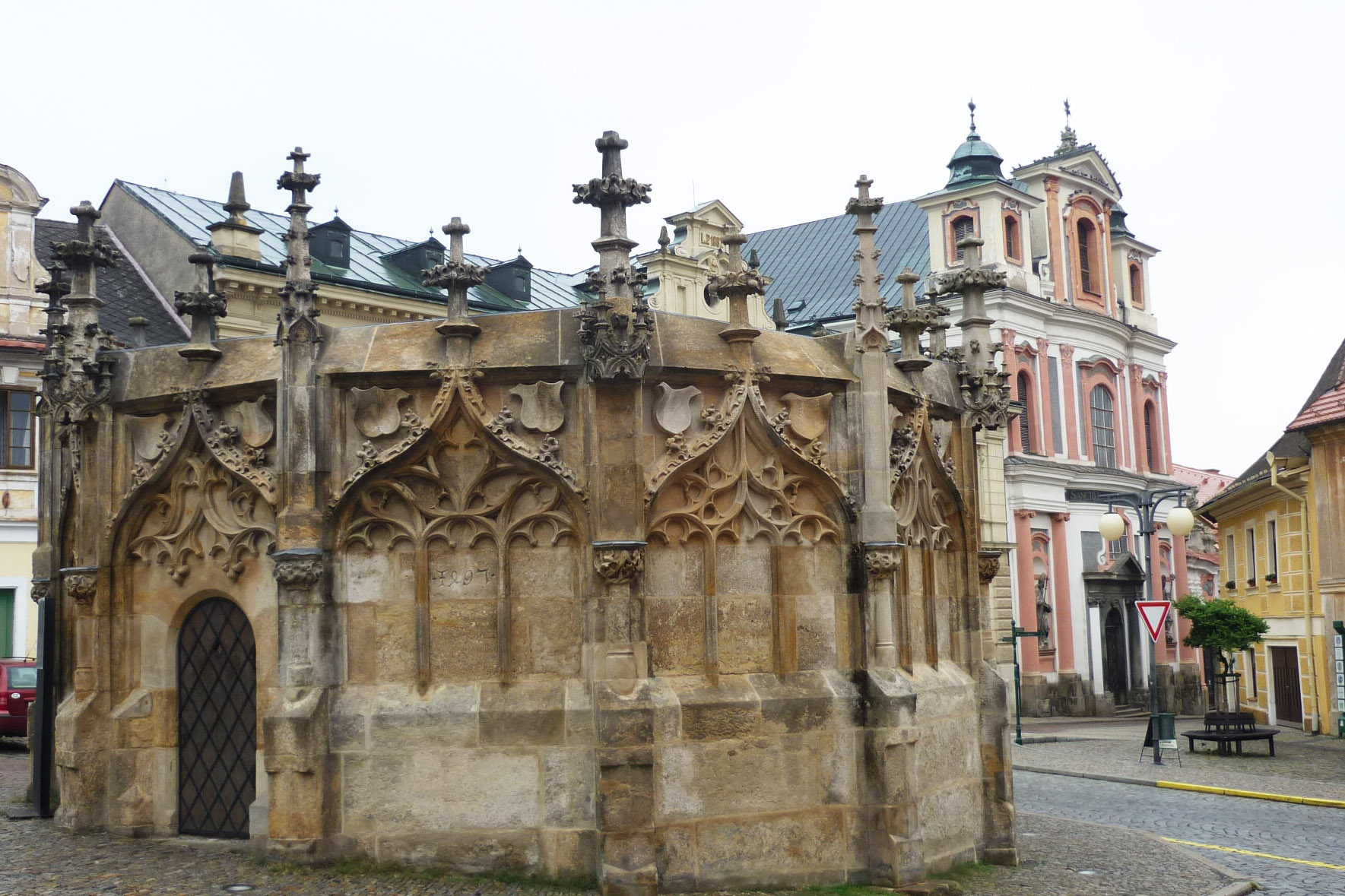 Sandsteinbrunnen und Nepomuk-Kirche in Kuttenberg / Kutná Hora